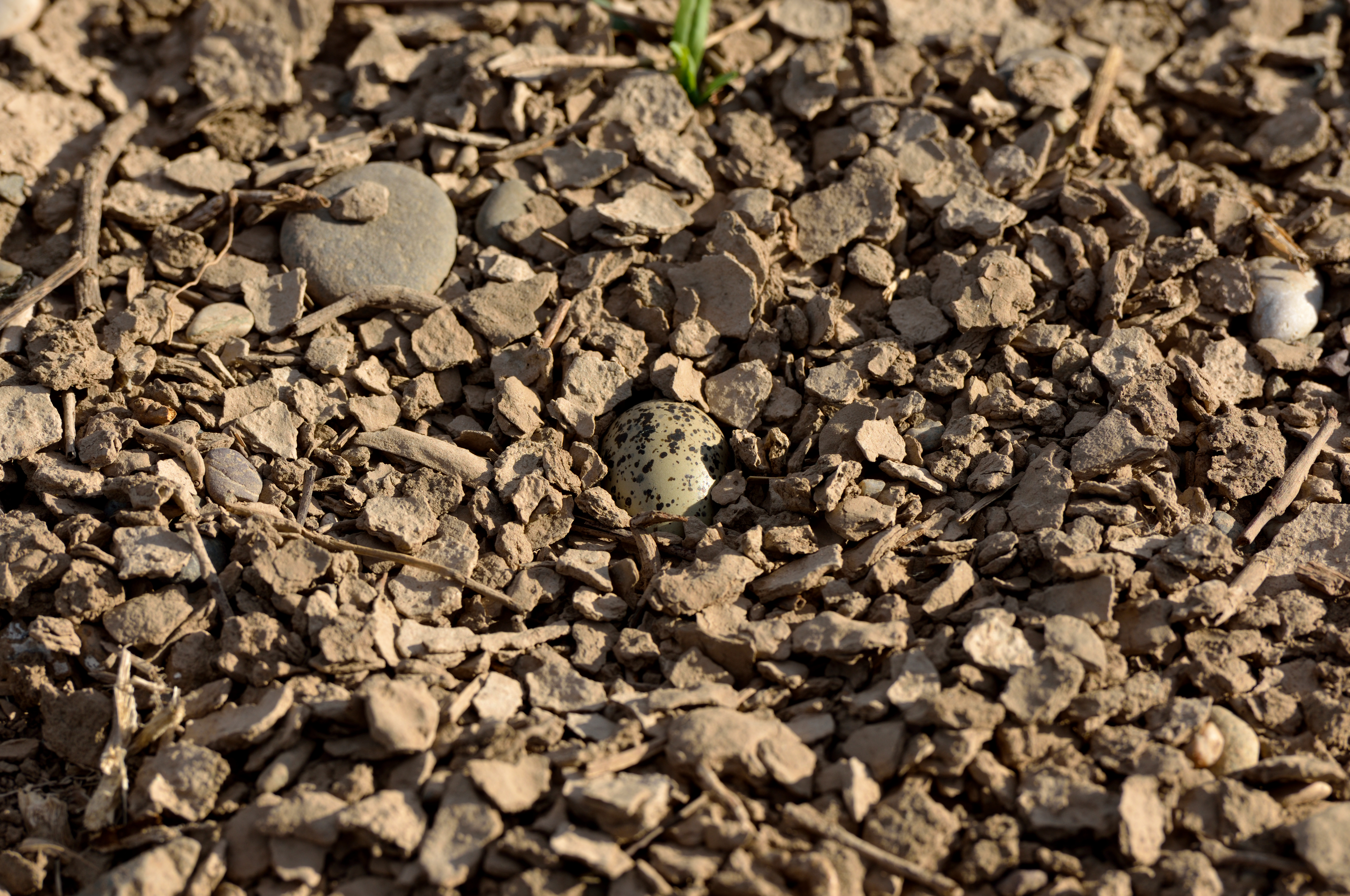 Kurdî: Hêka Pîwiyê